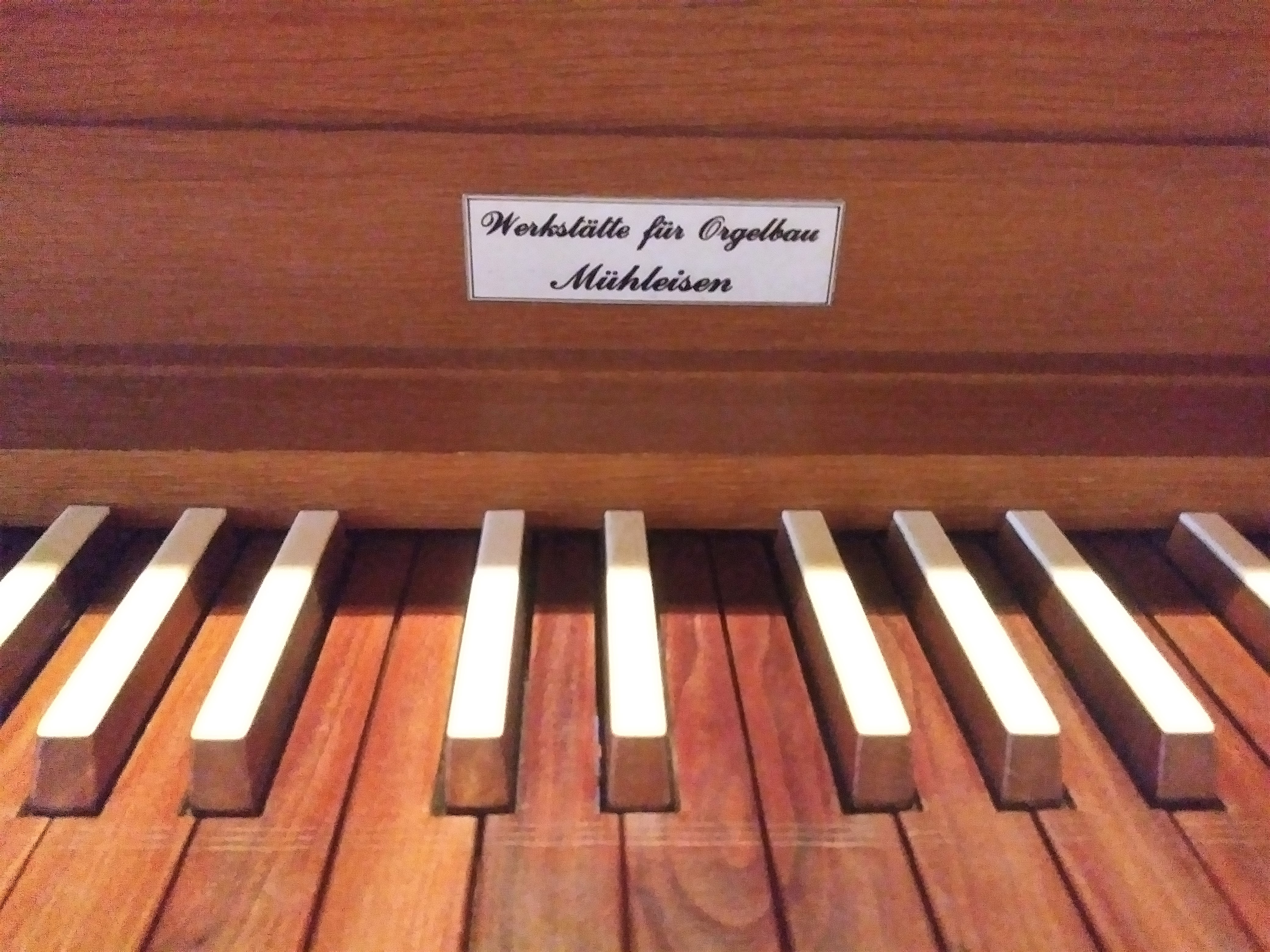 Mühleisen-Orgel in St. Bartholomäus Hasborn-Dautweiler